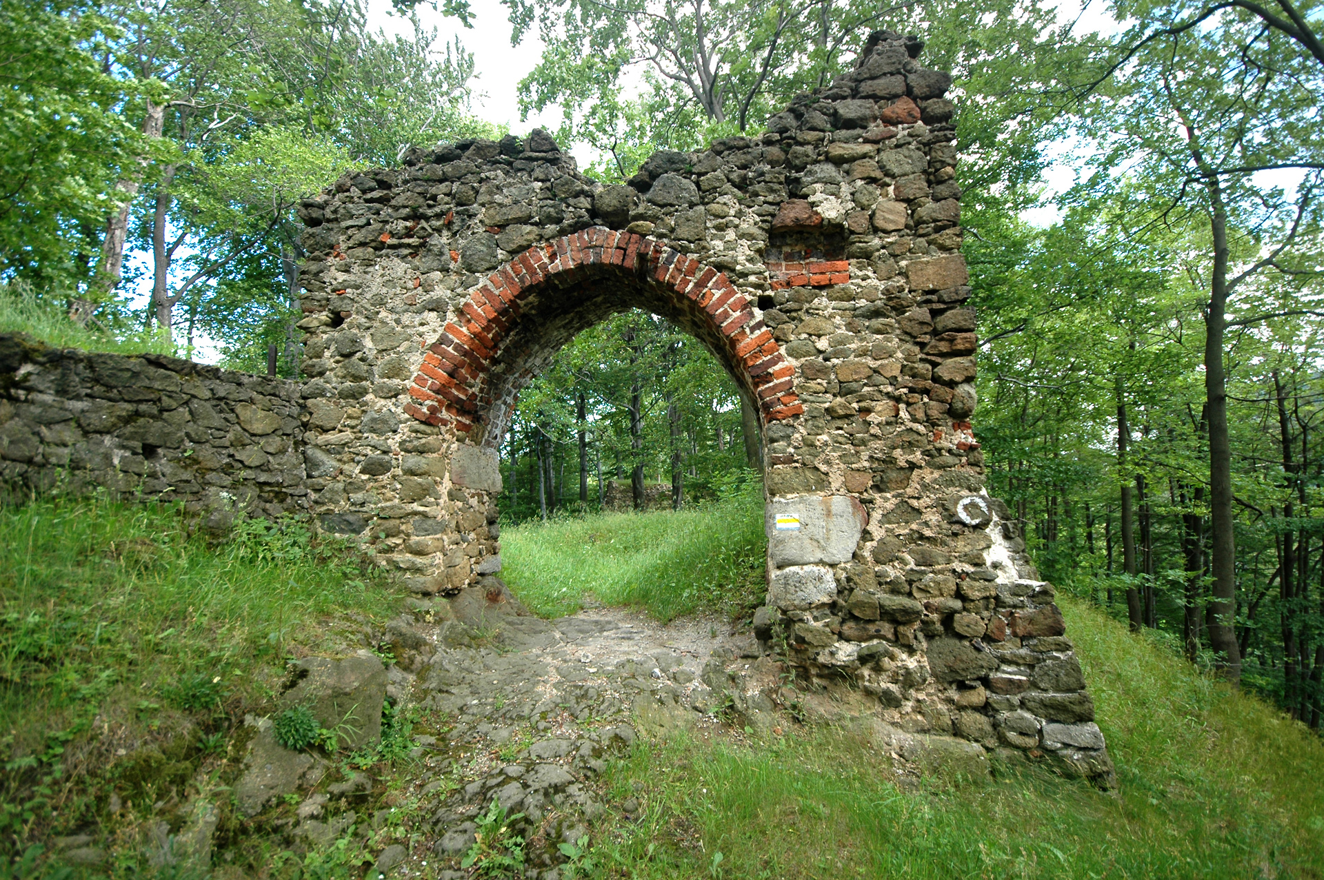 Wałbrzych - ruiny zamku „Nowy Dwór” (zwanego wcześniej Ogorzelec), XIV, XV, 1570